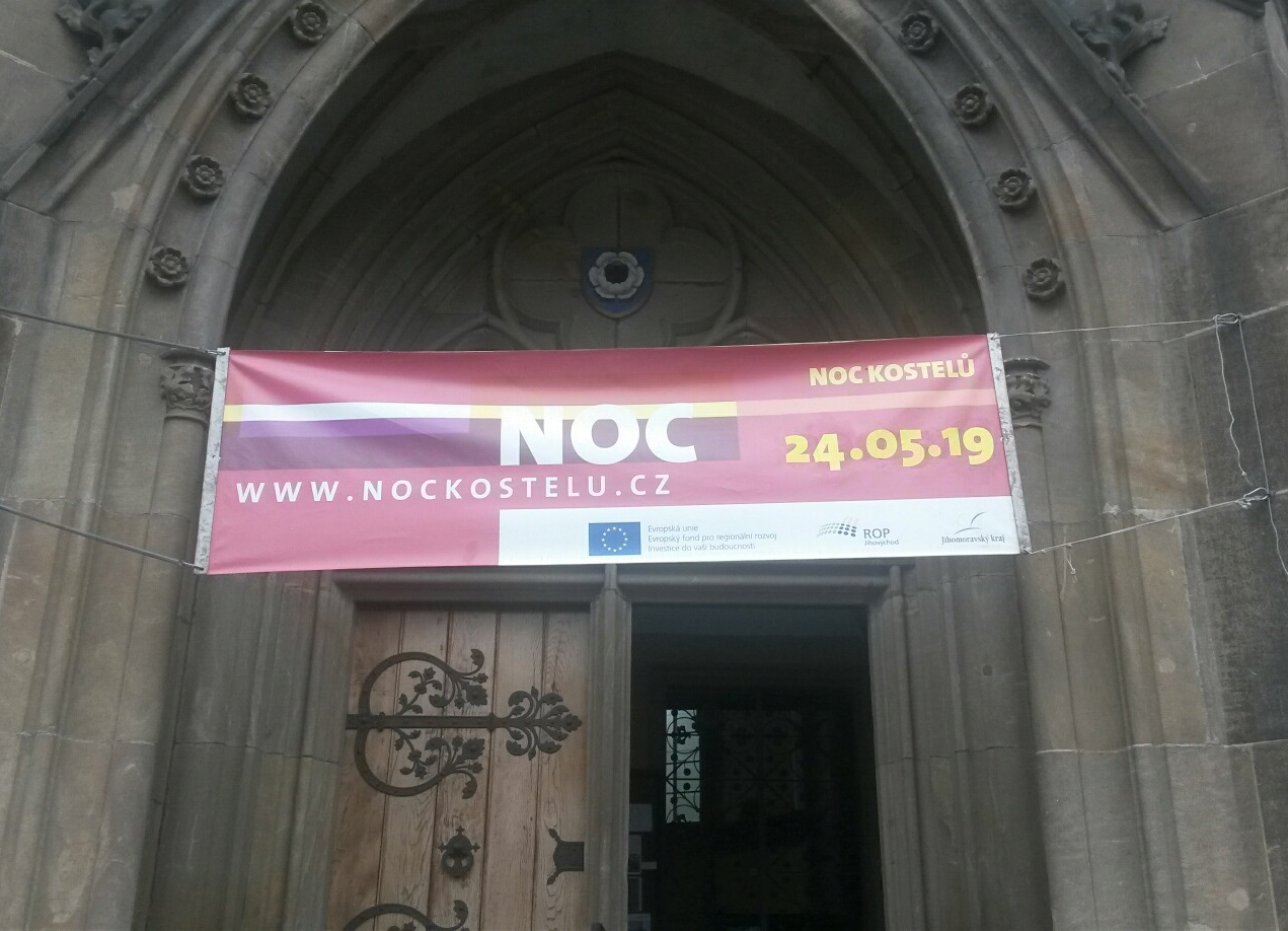 Pozvánka na Noc kostelů 2019 na Červeném kostele v Brně